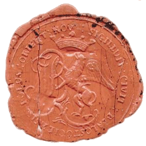 Pieczęć Izabeli z Poniatowskich Branickiej z herbem Białegostoku z początku XIX w.